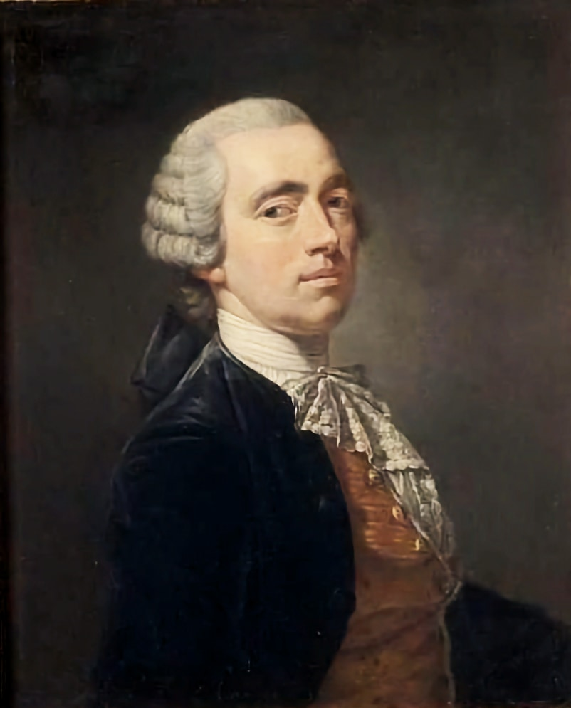 SE IPSUM PINXIT 1762